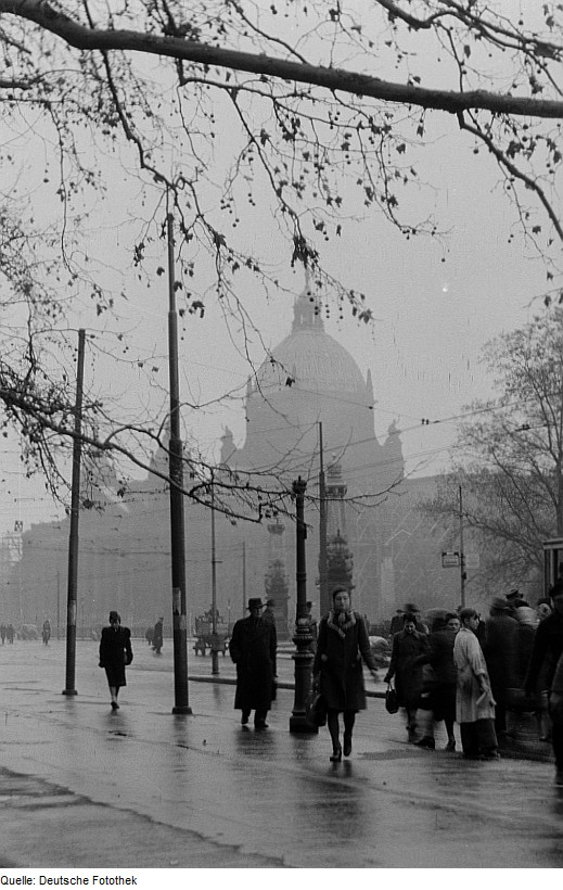 Original image description from the Deutsche FotothekPassanten auf dem Simsonplatz vor dem Reichsgericht